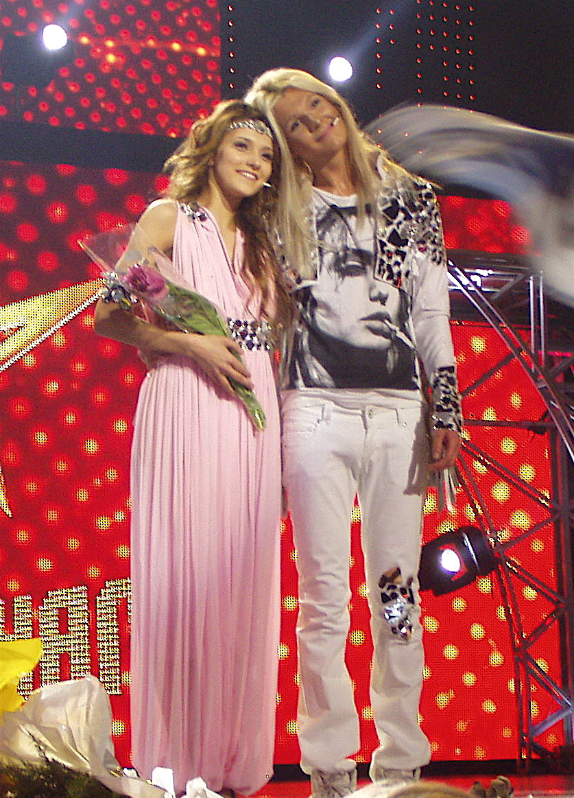 Борис Апрєль. Виступ з Регіною. "Gimme, gimme..."